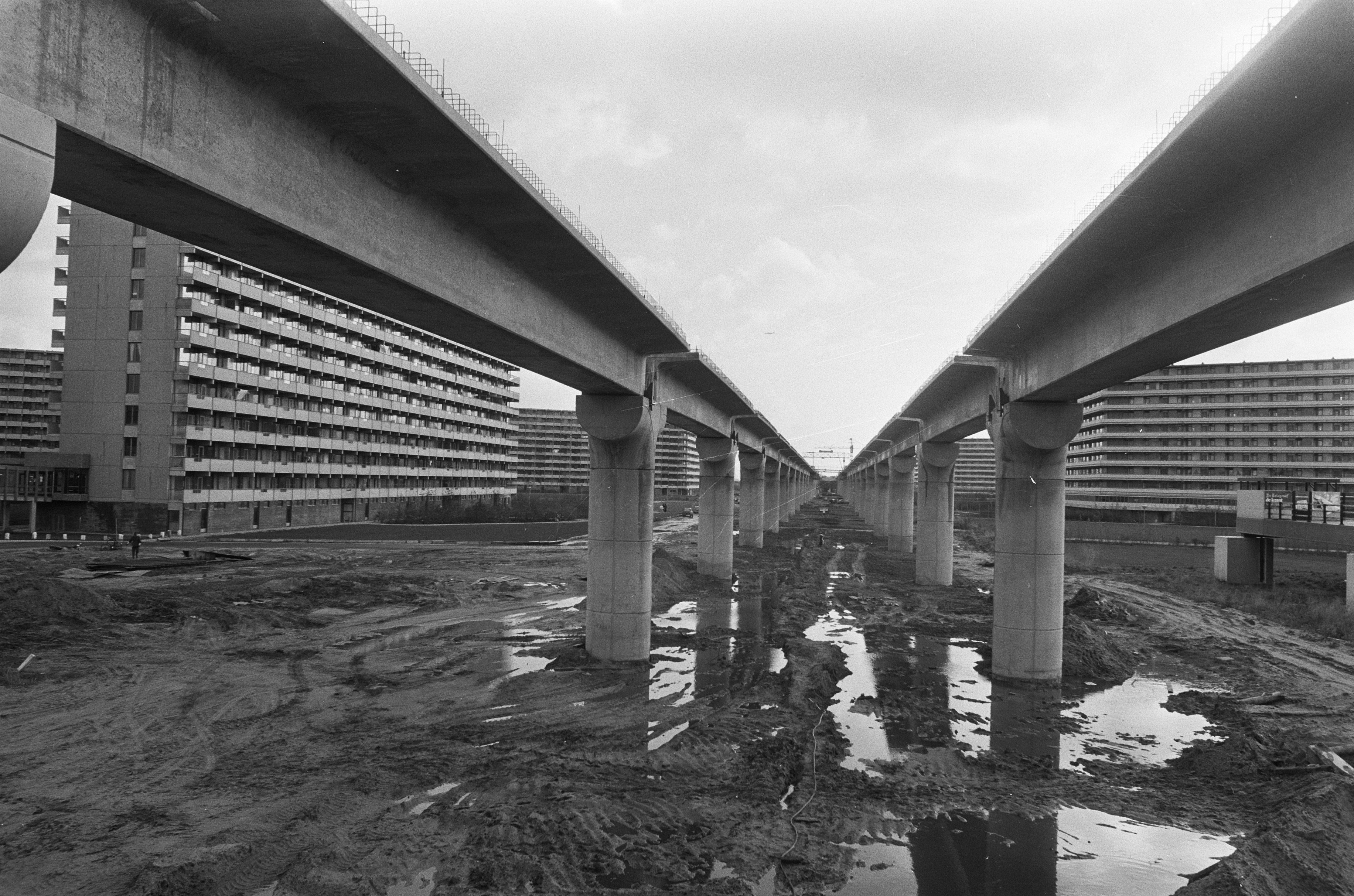 Collectie / Archief : Fotocollectie Anefo Reportage / Serie : De voortgang van de metrobouw in de Bijlmermeer Beschrijving : De betonnen pilaren waarover de metrobaan zal lopen Datum : 15 november 1973 Locatie : Amsterdam, Noord-Holland Trefwoorden : bouwwerkzaamheden, metro, metrobouw Fotograaf : Fotograaf Onbekend / Anefo Auteursrechthebbende : Nationaal Archief Materiaalsoort : Negatief (zwart/wit) Nummer archiefinventaris : bekijk toegang 2.24.01.05 Bestanddeelnummer : 926-8286